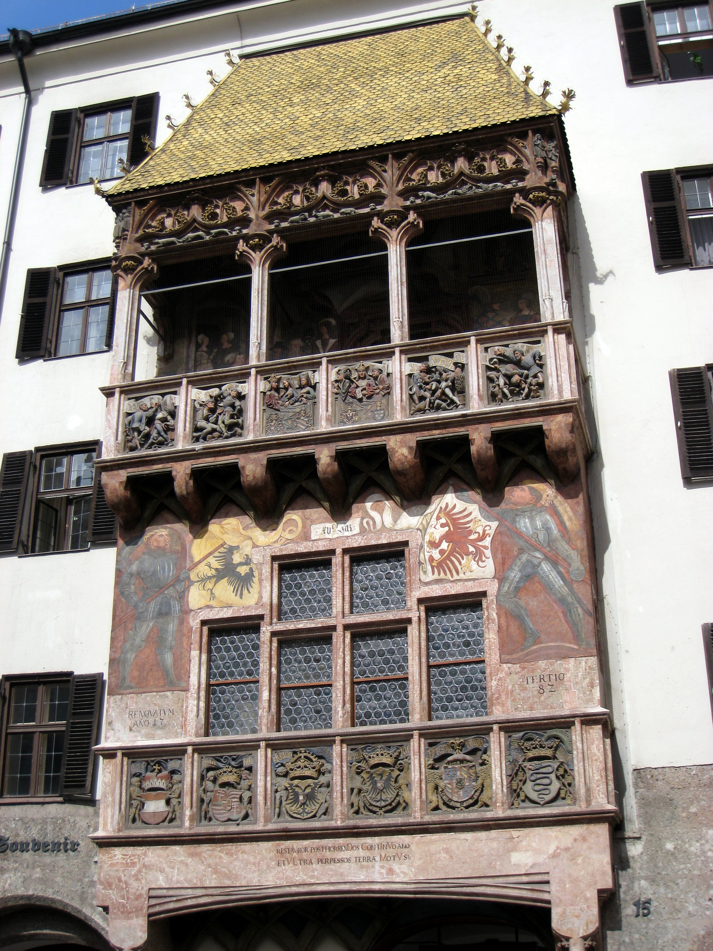 Innsbruck, Austria - Goldenes Dachl.